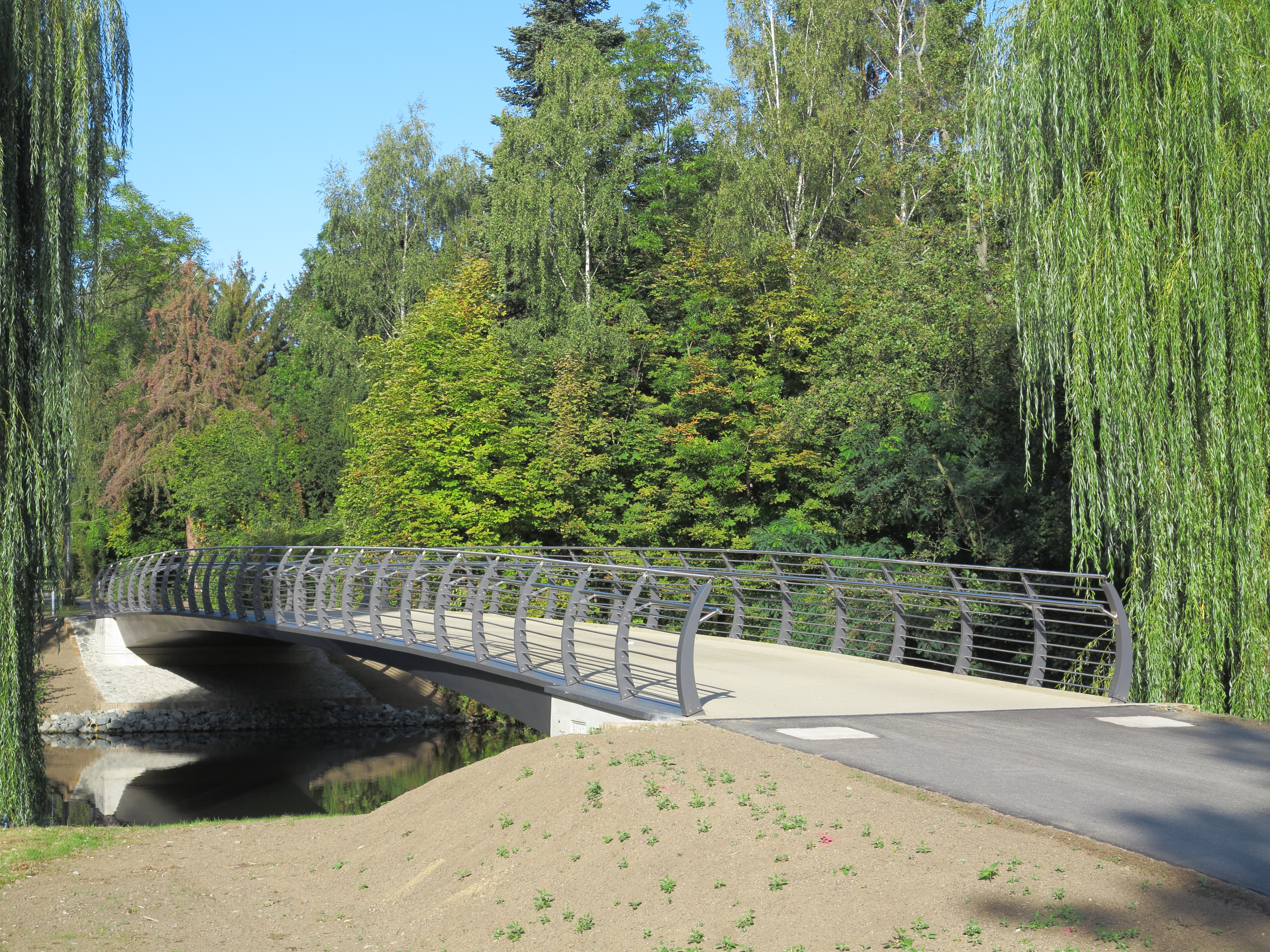 Braunschweig: Die 2019 erbaute neue Hoheworthbrücke im Bürgerpark